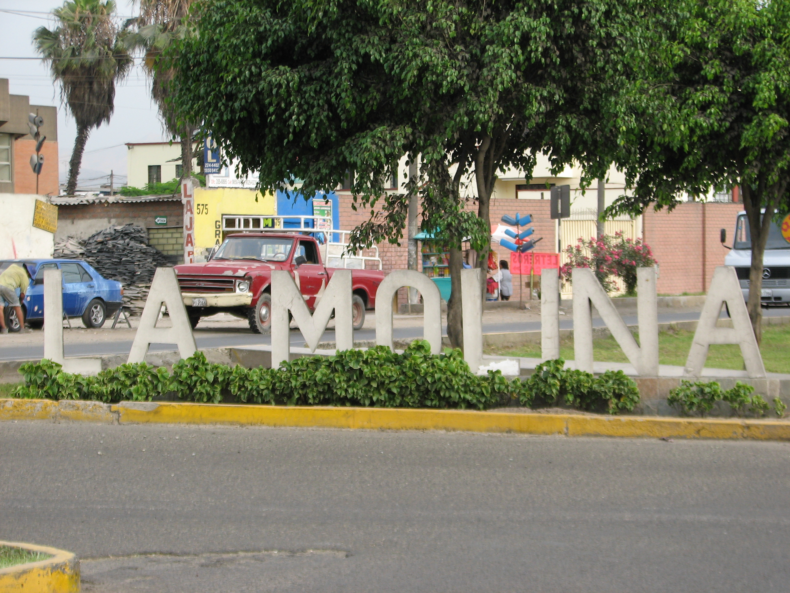 District sign La Molina district at Av. La Molina in La Molina/Lima, Peru.